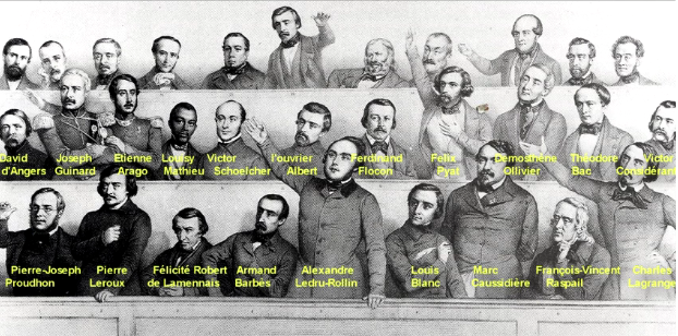 Les députés de la gauche démocrate et socialiste élus à la chambre des députés en mai 1849